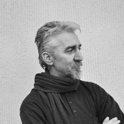 Горан Гатарић